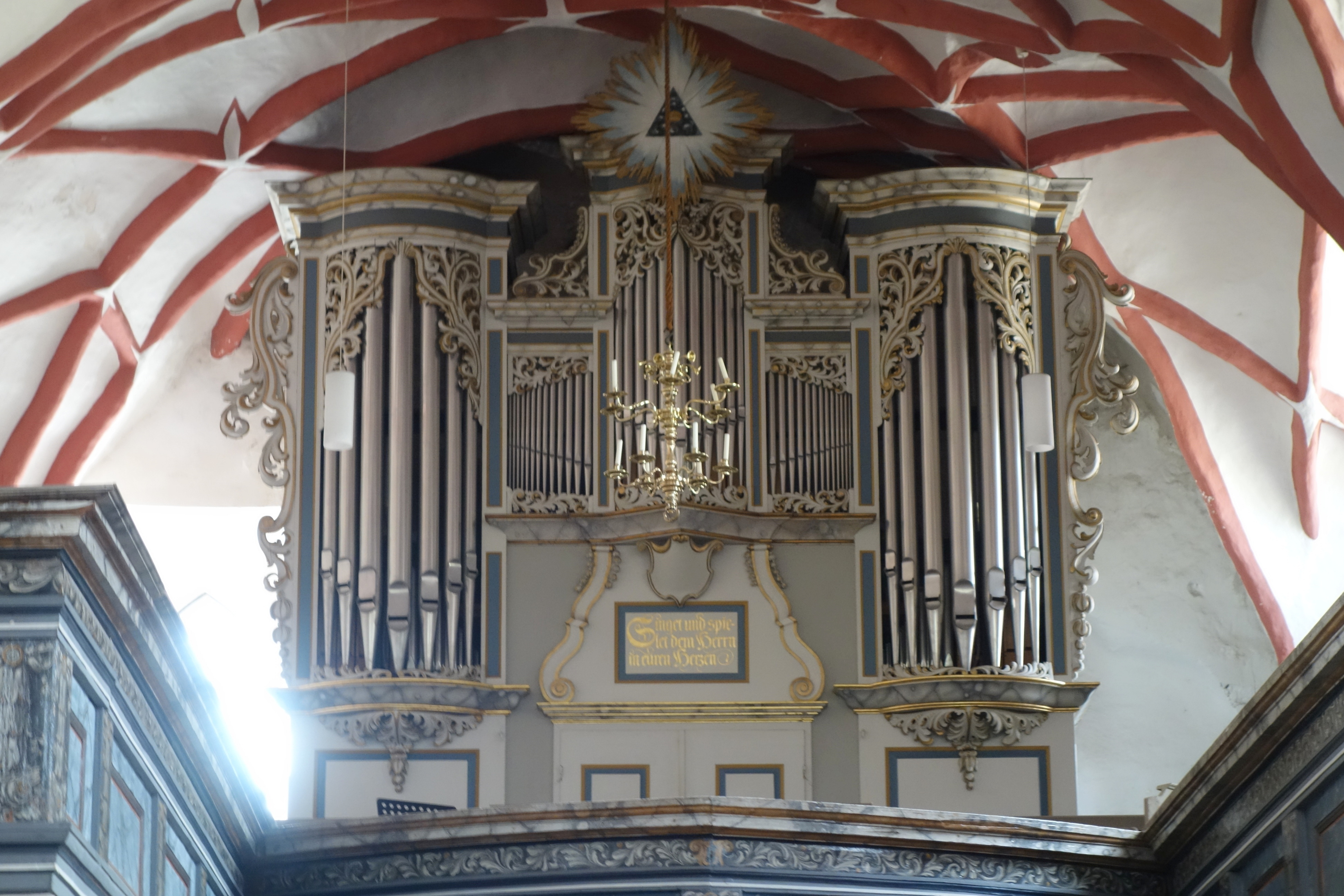 Stadtpfarrkirche St. Nikolai, Bad Freienwalde, Märkisch-Oderland, Brandenburg, Deutschland